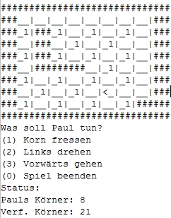 Typische Java-Hamster-Implementierung auf Konsolenbasis